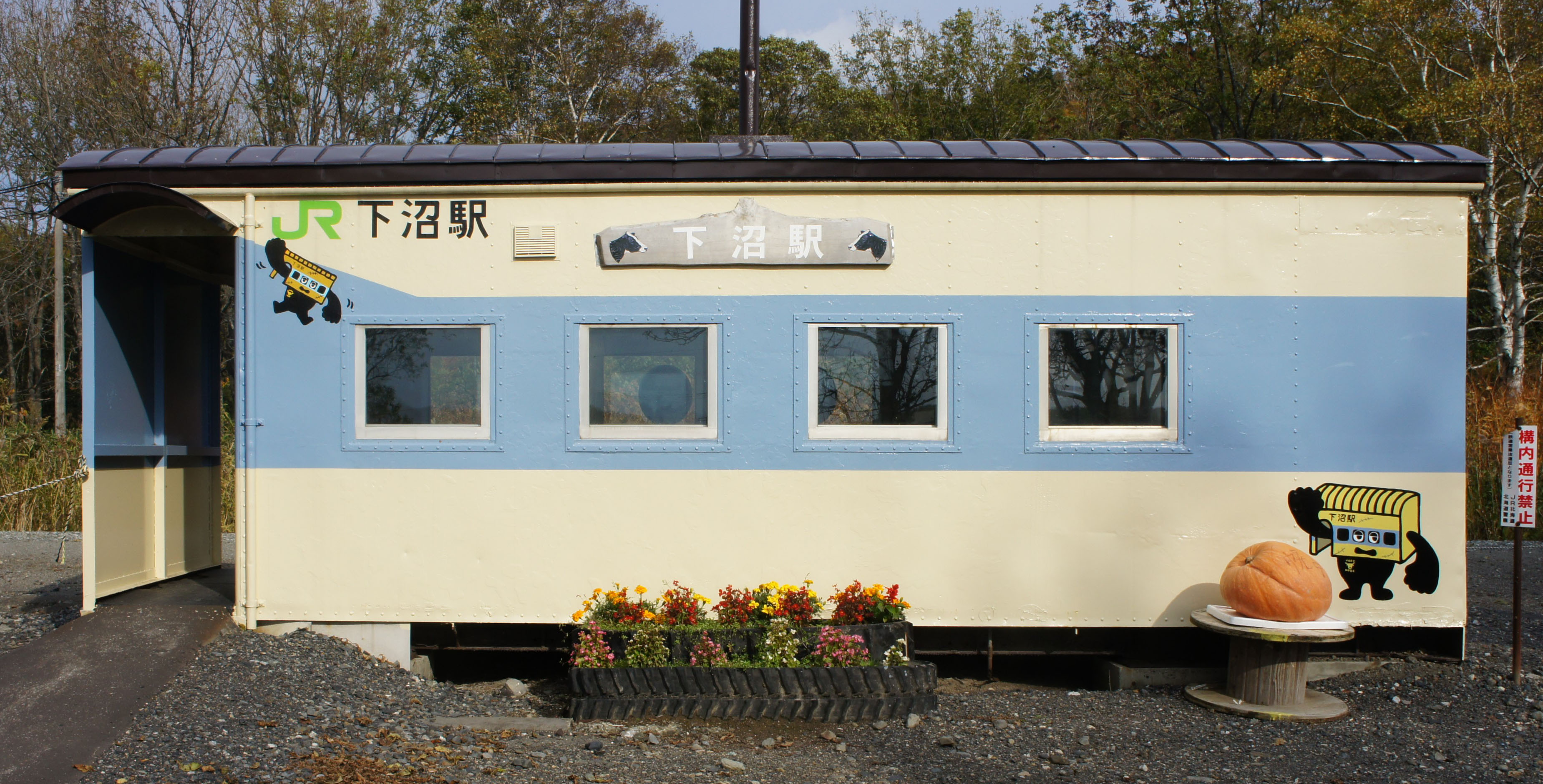 JR宗谷本線・下沼駅の駅舎（駅前通り側） Sony NEX-3